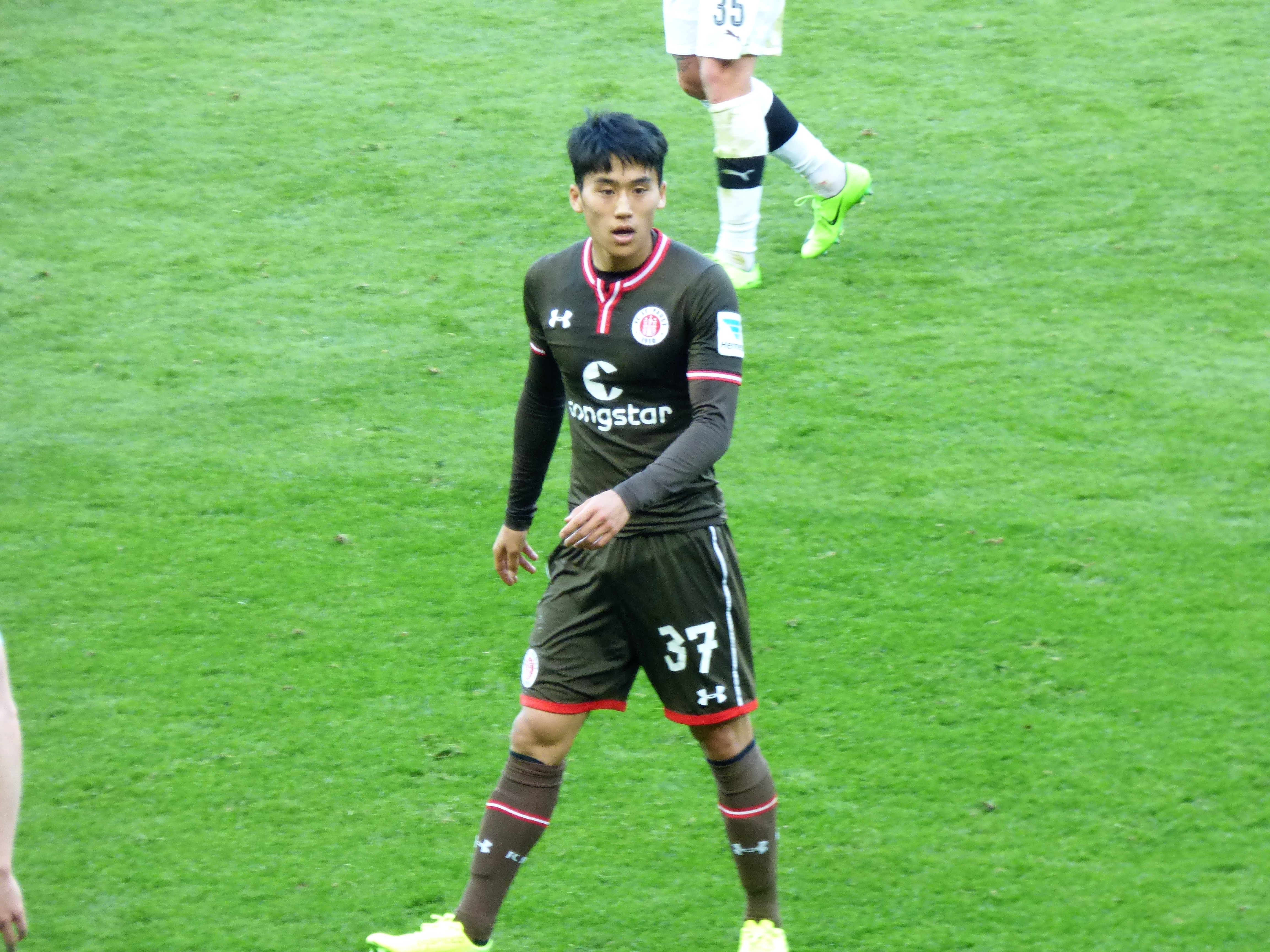 Kyoungrok Choi im Trikot des FC St.Pauli 2017